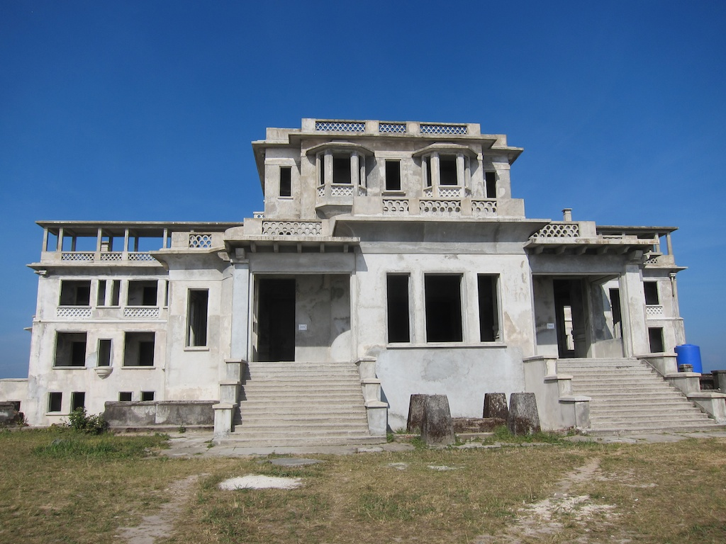 Façade sud